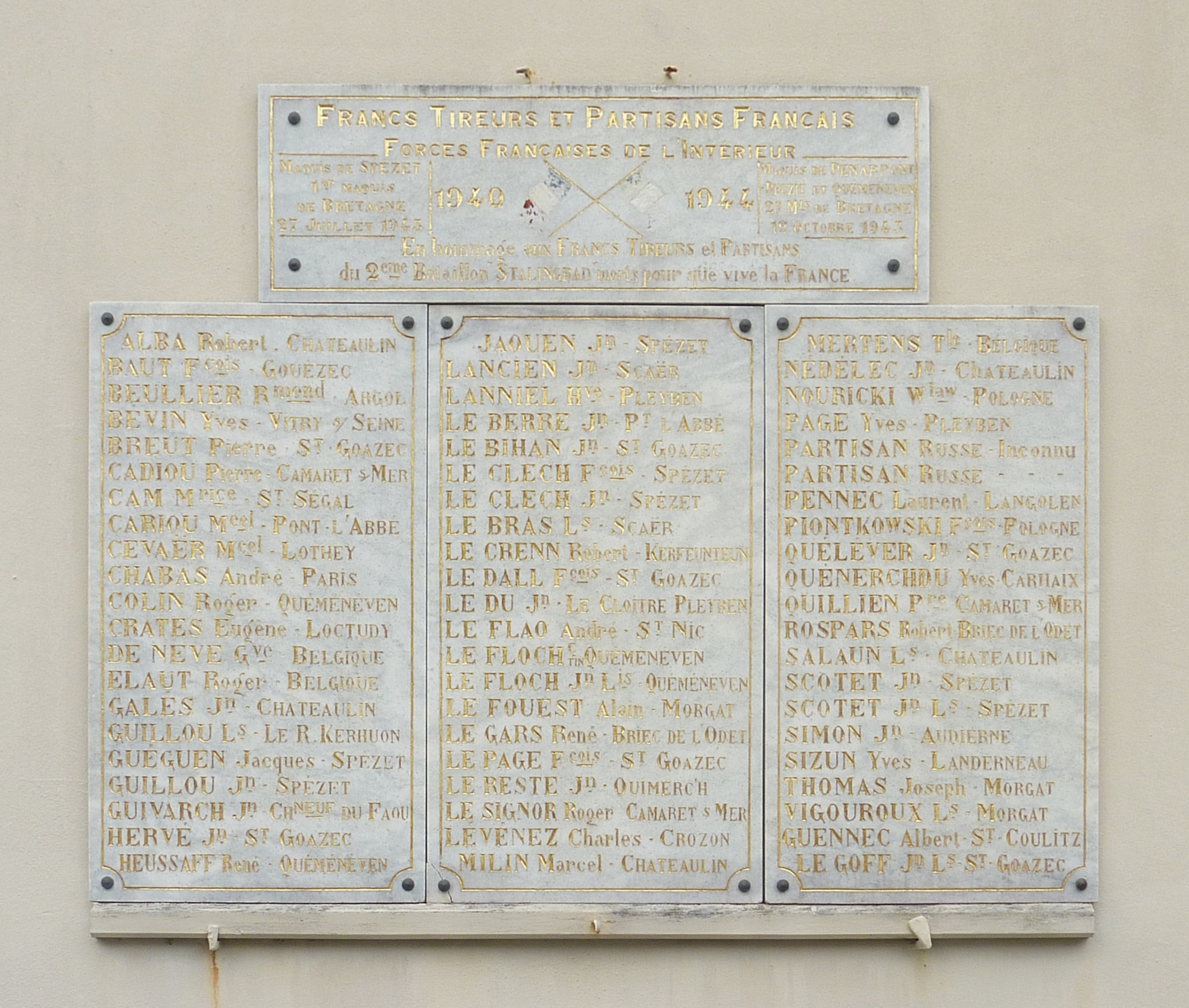 Châteaulin : le monument aux morts Francs-Tireurs et Partisans